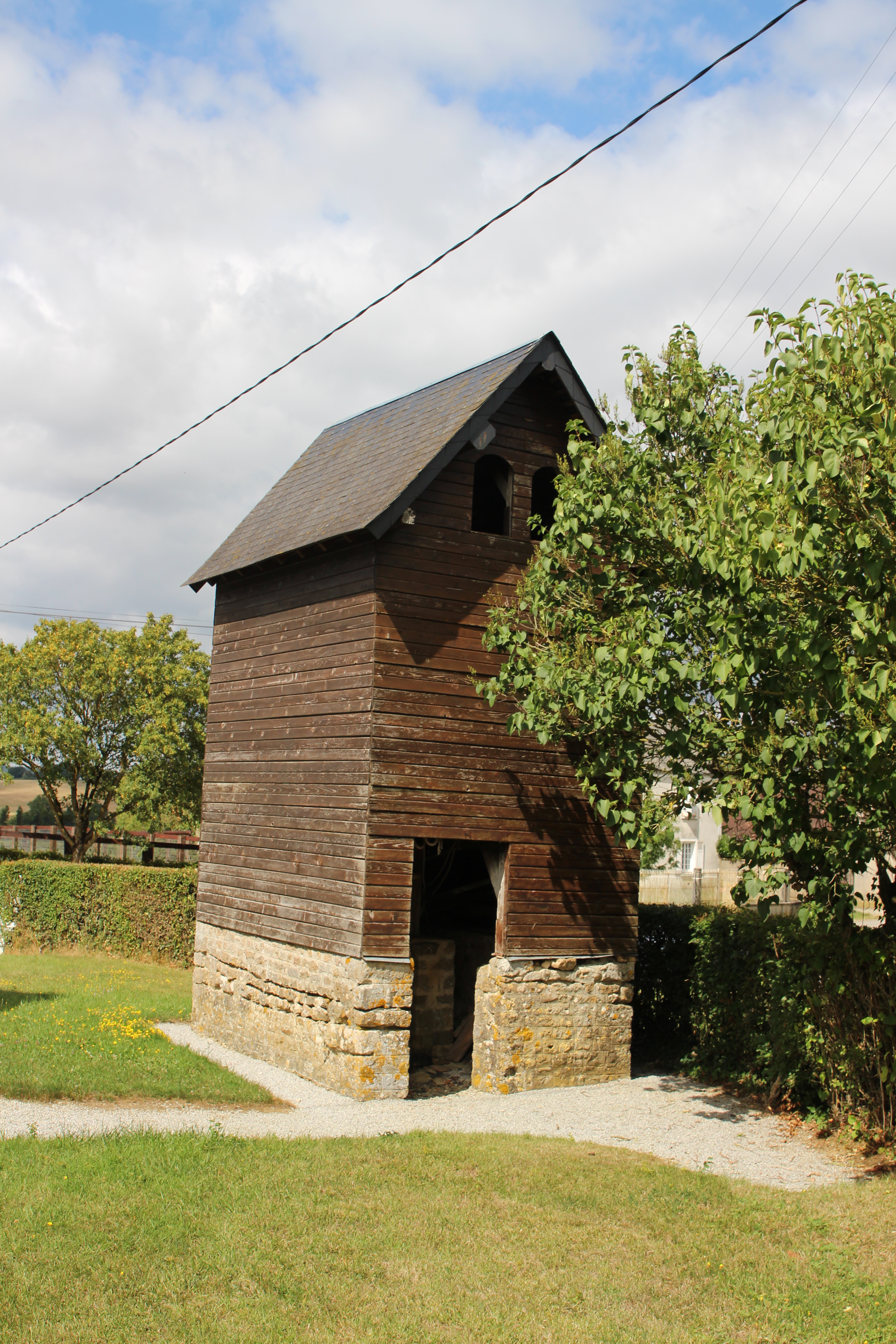 Saint-Léonard-des-Parcs, Orne